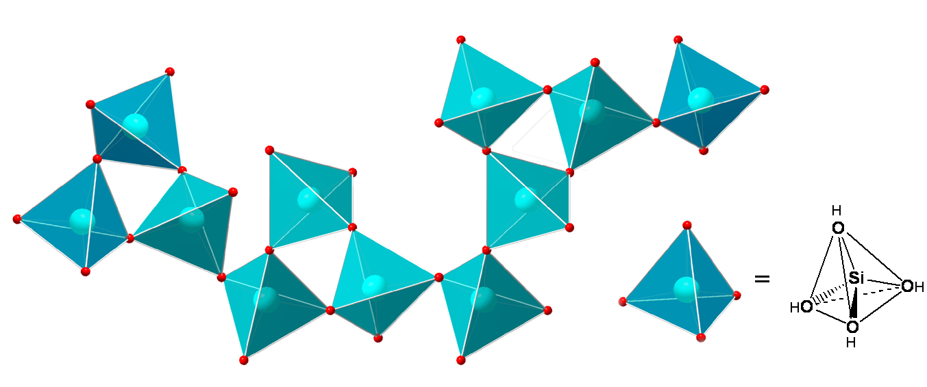 Architecture moléculaire réalisée à partir de tétraèdres SiO44-. Auteur : Frédéric Chaput, réalisé avec un programme de dessin. Licence GFDL Frédéric Chaput